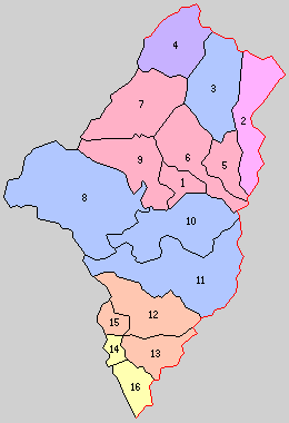 長野県西筑摩郡（現・木曽郡）の町村。